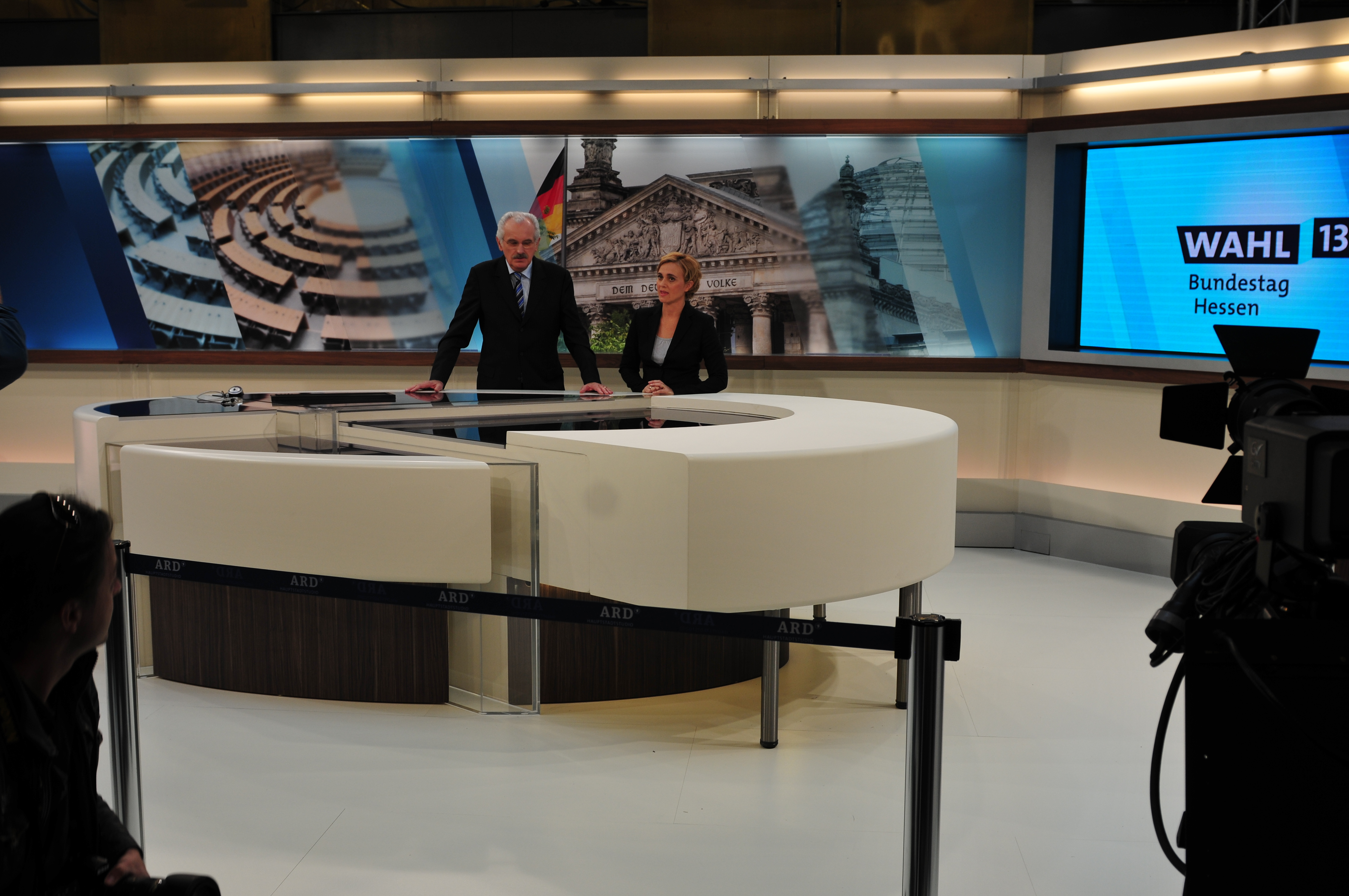 Berichterstattung zur Bundestagswahl aus dem Hauptstadtstudio Berlin; Pressetermin am 20. Sept. 2013